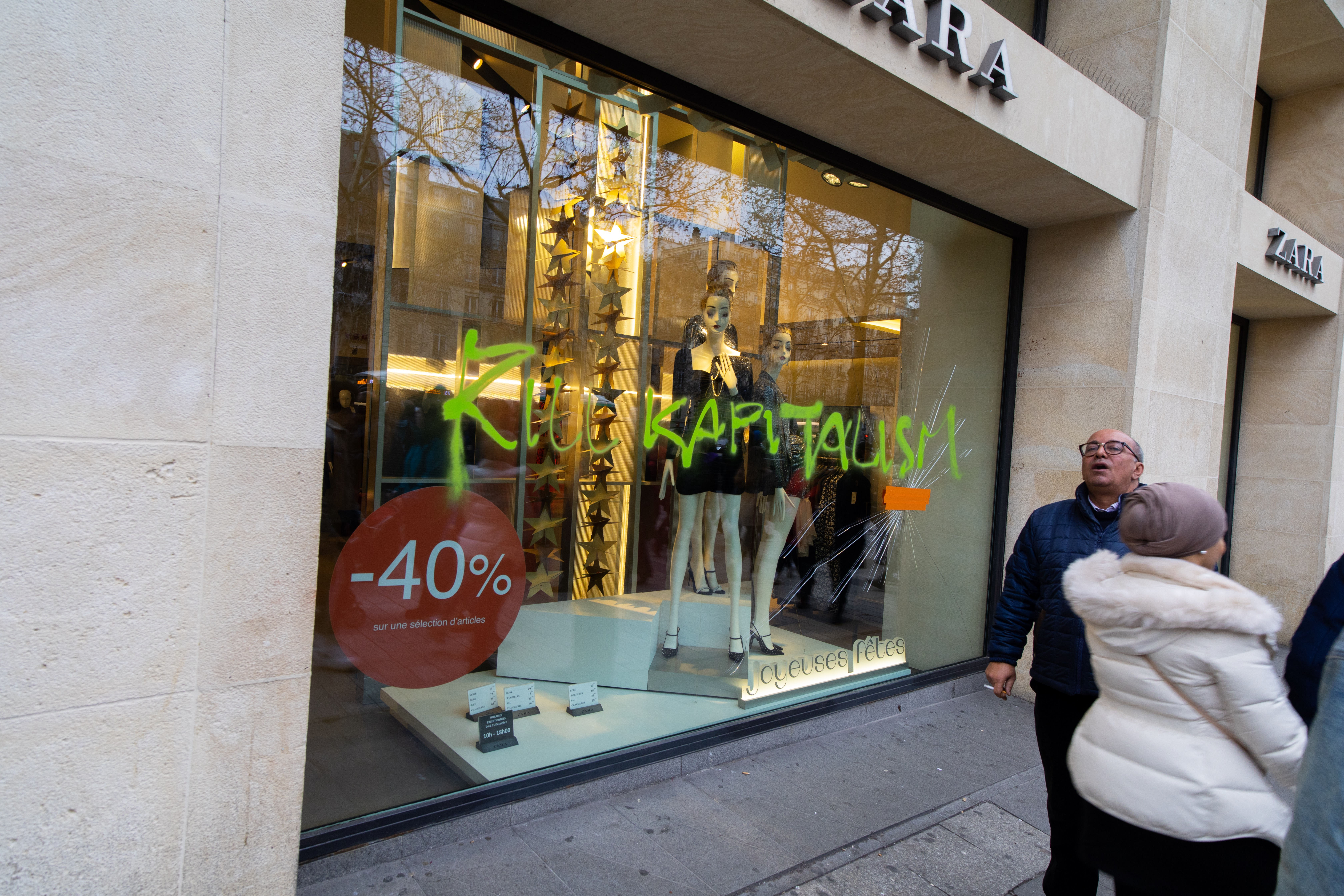 黄色いベスト運動で割られ、落書きされたシャンゼリゼ通りのZARAの窓ガラス。"KILL KAPITALISM"（資本主義を殺せ）と書かれている。2019年1月１日撮影。